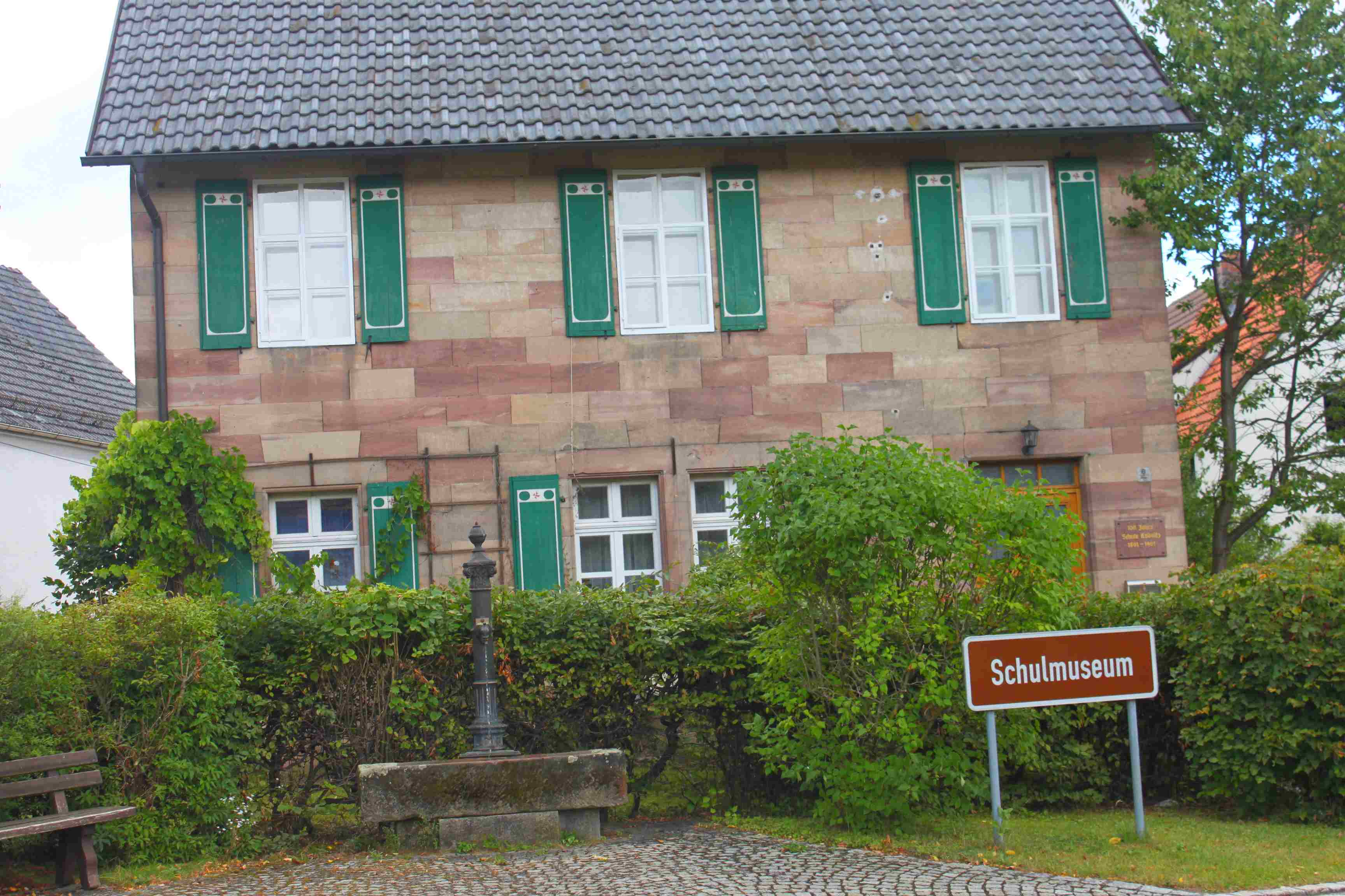 Das Dorfschulmuseum zeigt auf zwei Stockwerken Lehr- und Lernmittel, Geräte, Bücher, Sammlungen und Präparate, wie sie früher in Dorfschulen üblich waren